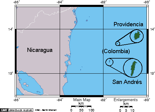 San Andrés y Providencia Department of Colombia. Graphic by Keith Edkins, base maps from On-Line Map Creation